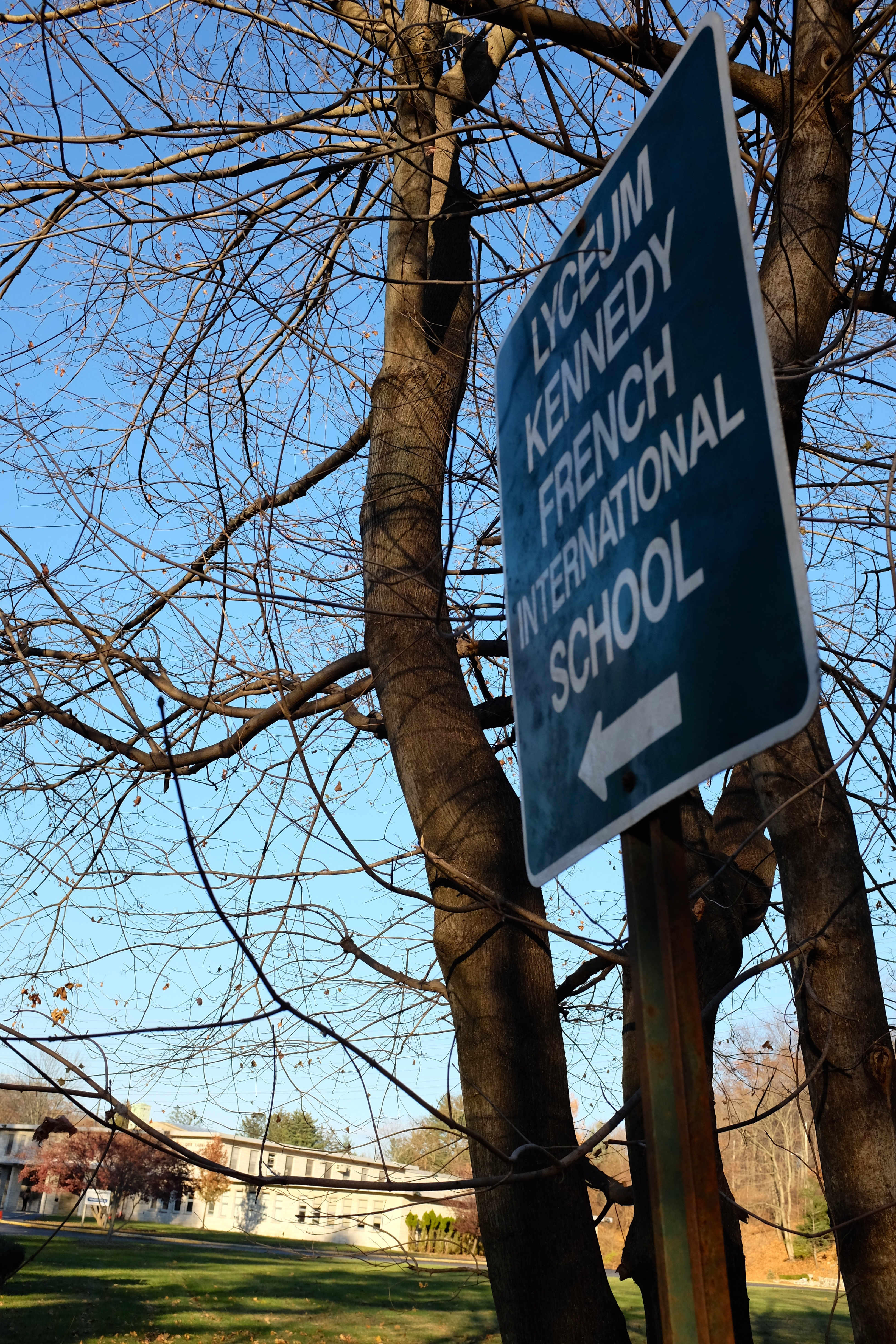 Lyceum Kennedy, Campus d'Ardsley